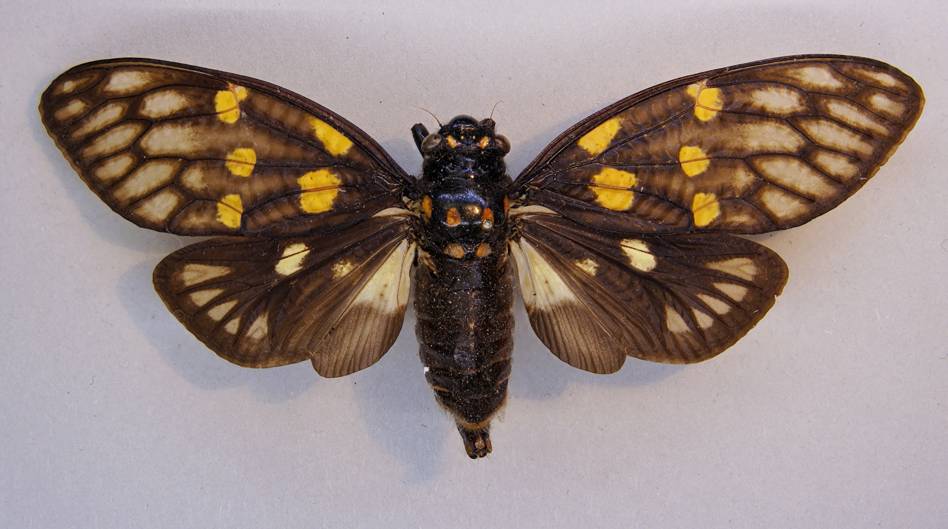 Gaeana maculata (Drury, 1773) Herkunft: Tonkin, Than-Moi